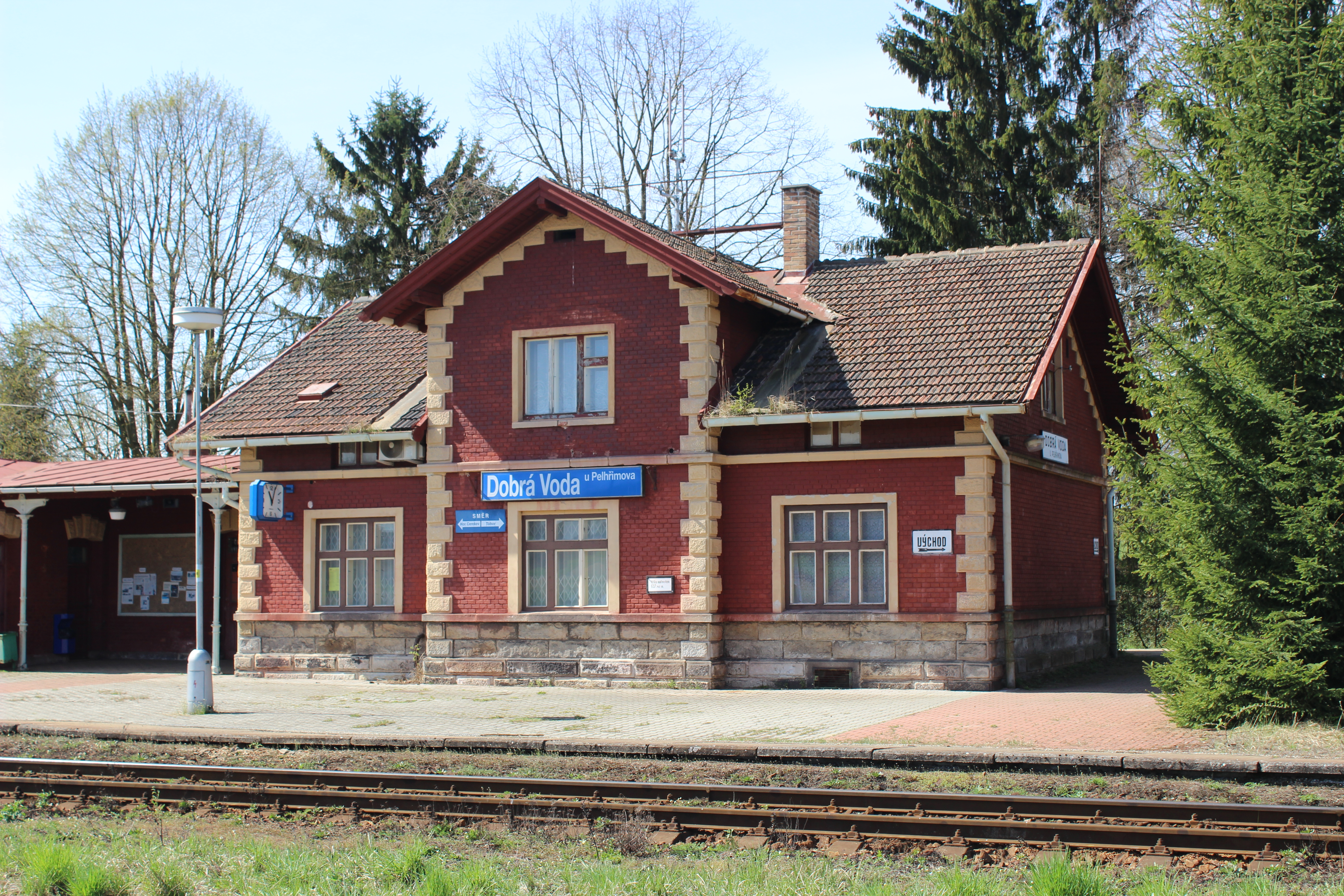 Staniční budova v Dobré Vodě. Project: Fotíme Česko.